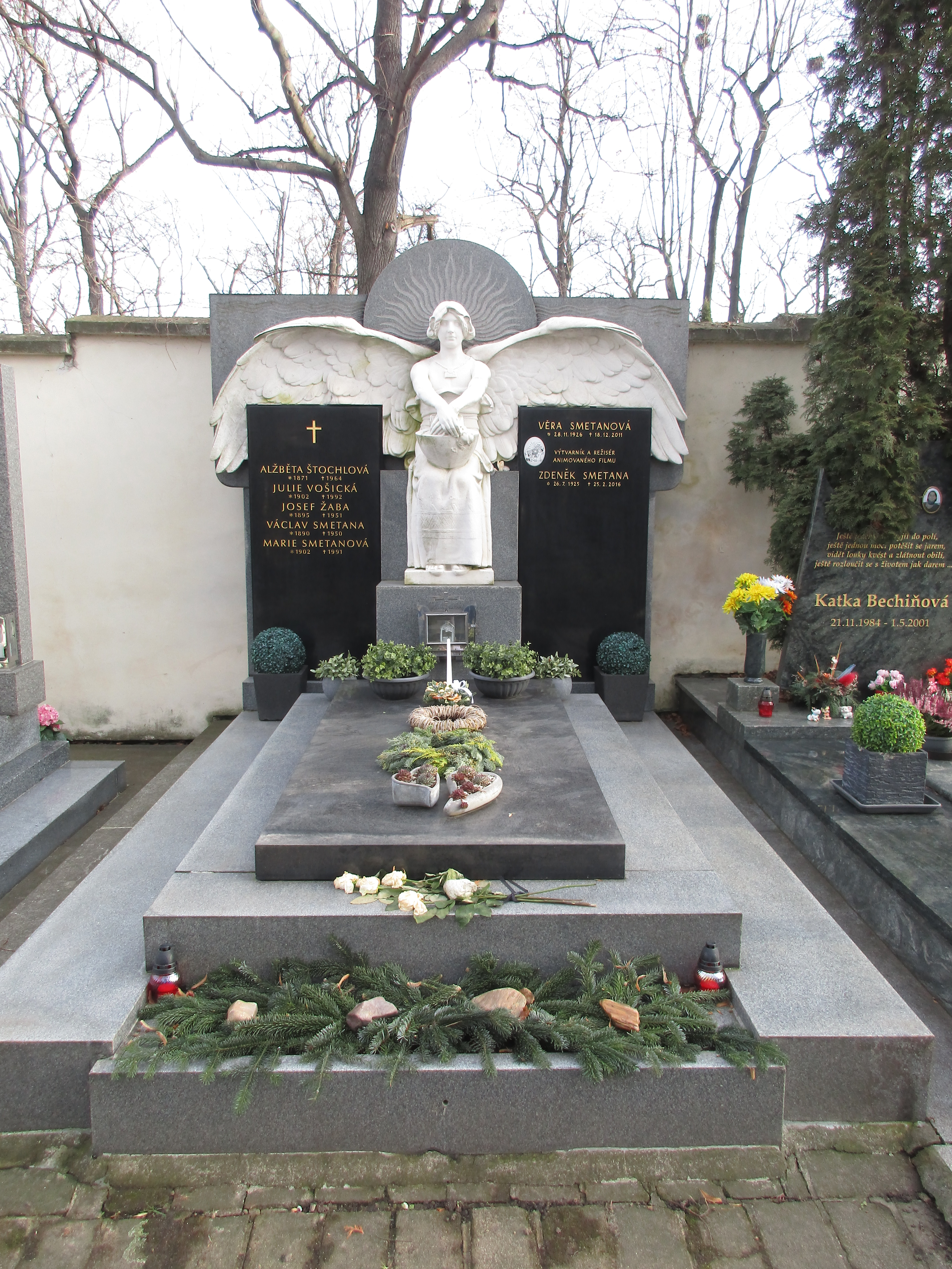 Zdeněk Smetana - český ilustrátor.